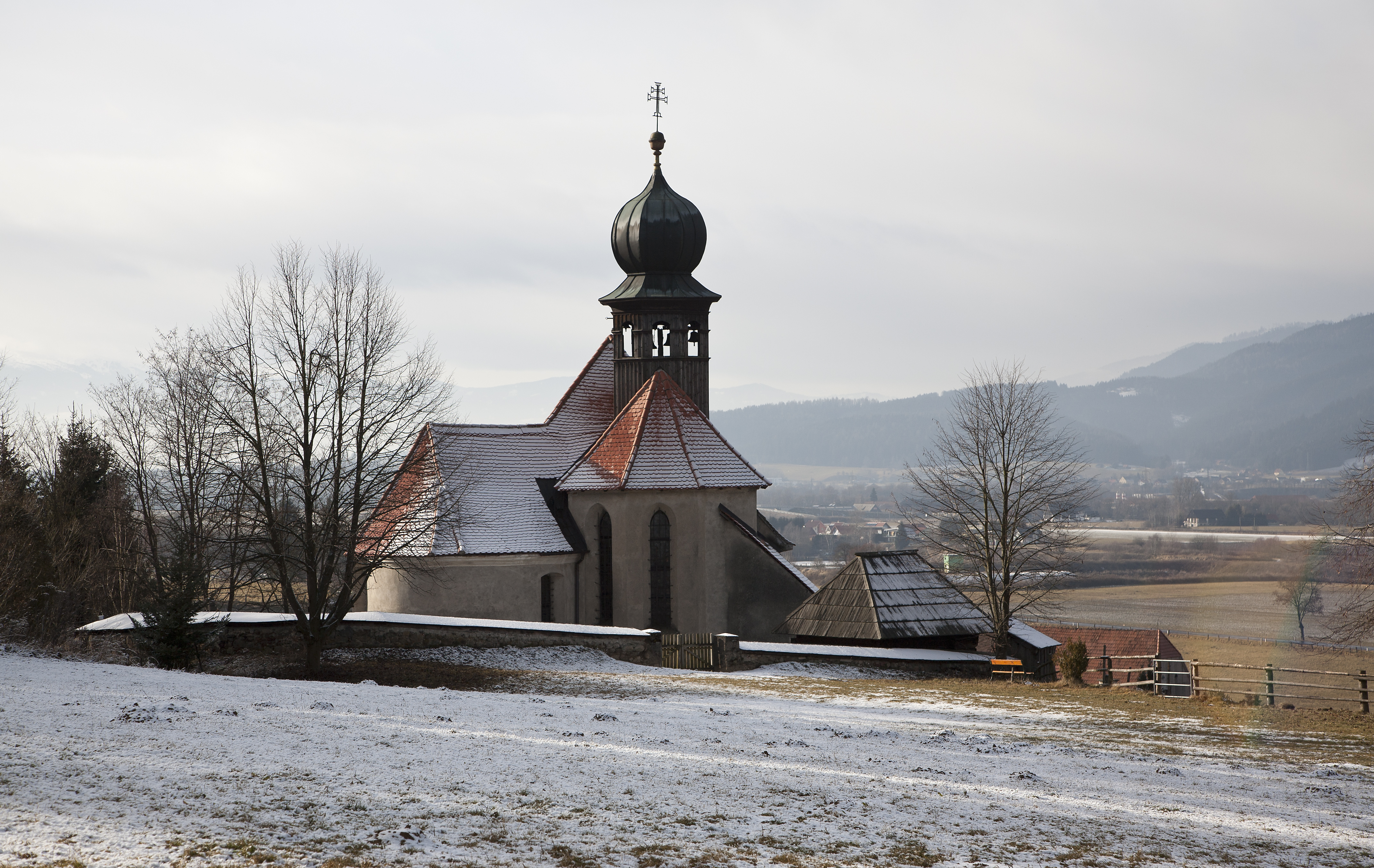 Kirche Sankt Benedikten bei Knittelfeld